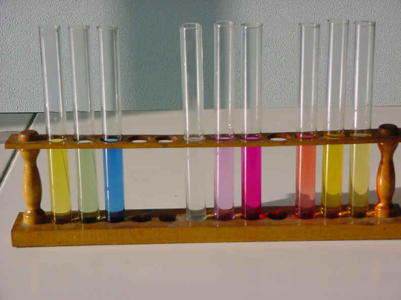 Zones de virage des trois principaux indicateurs colorés : BBT, Hélianthine, Phénolphtaléine